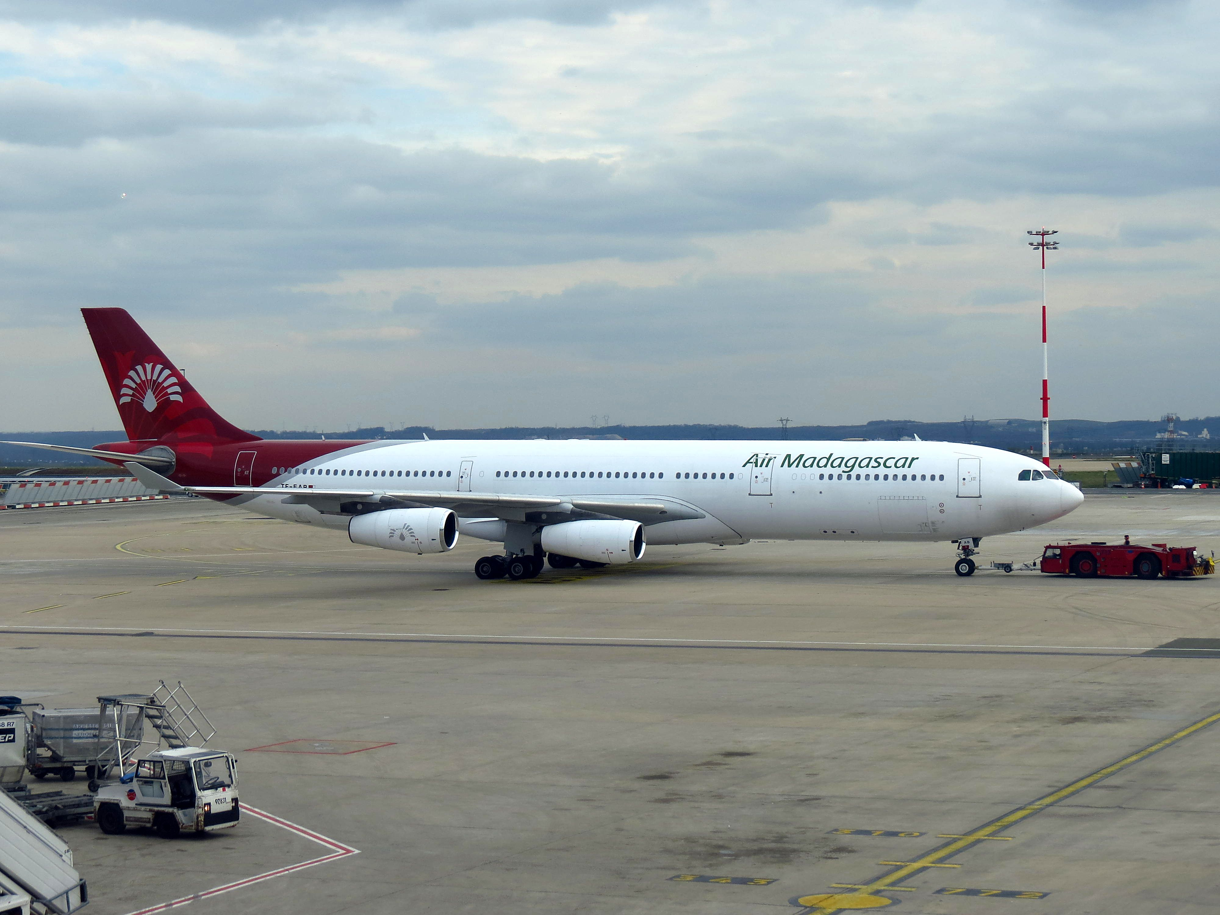 Air Madagascar Airbus A340-300 Paris Charles de Gualle Airport